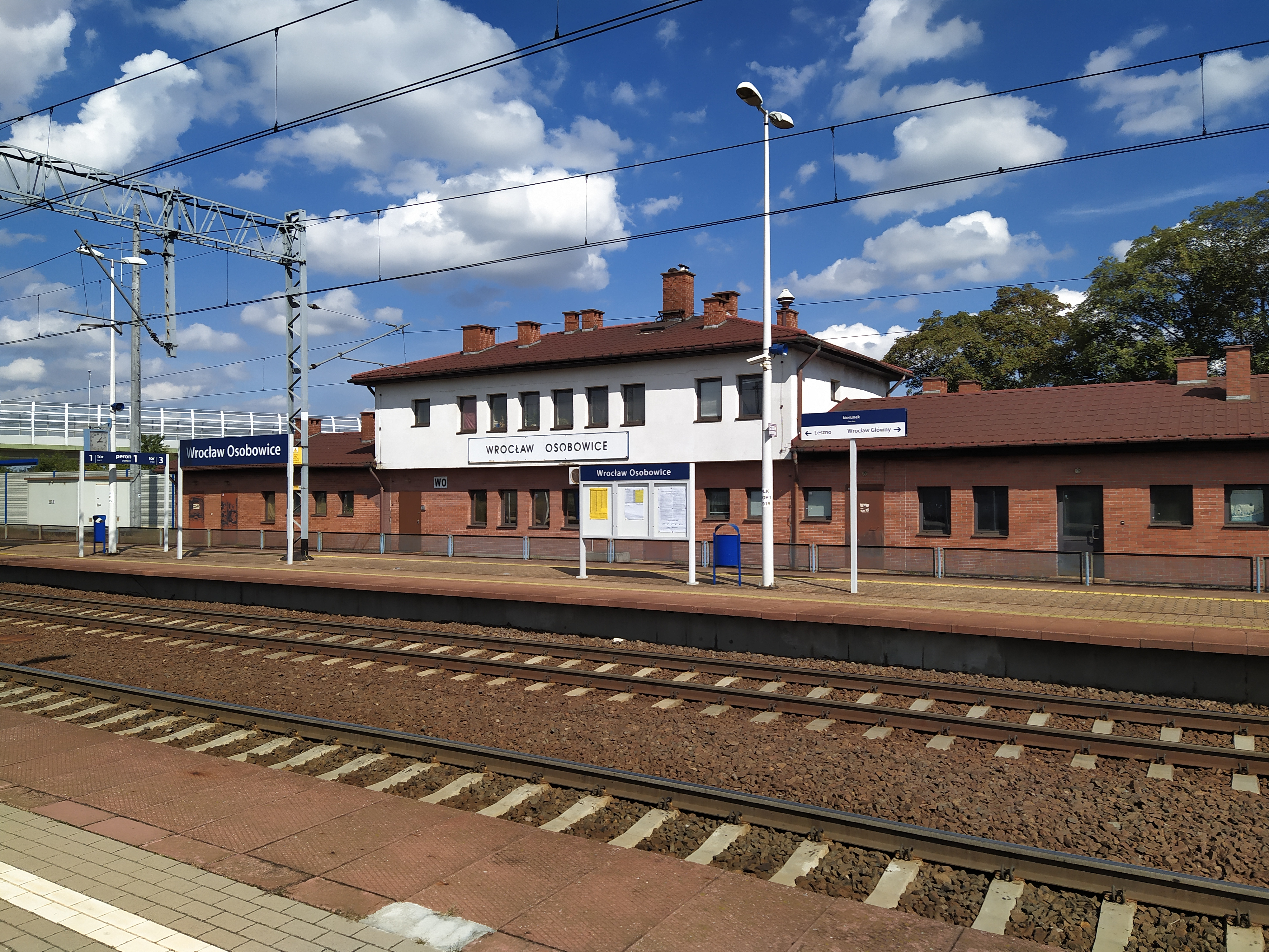 Stacja kolejowa Wrocław-Osobowice na osiedlu Lipa Piotrowska wraz z budynkiem dworca.